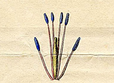 Ausschnitt (Klasse XV) aus Ehrets Tafel "Methodus Plantarum Sexualis"